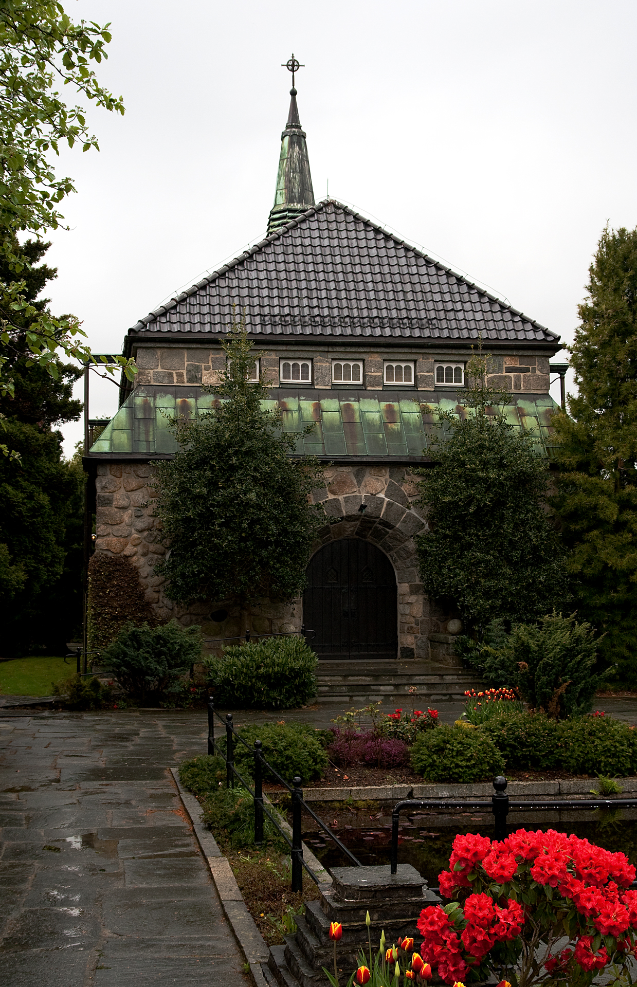 Eiganes gravlund kapell